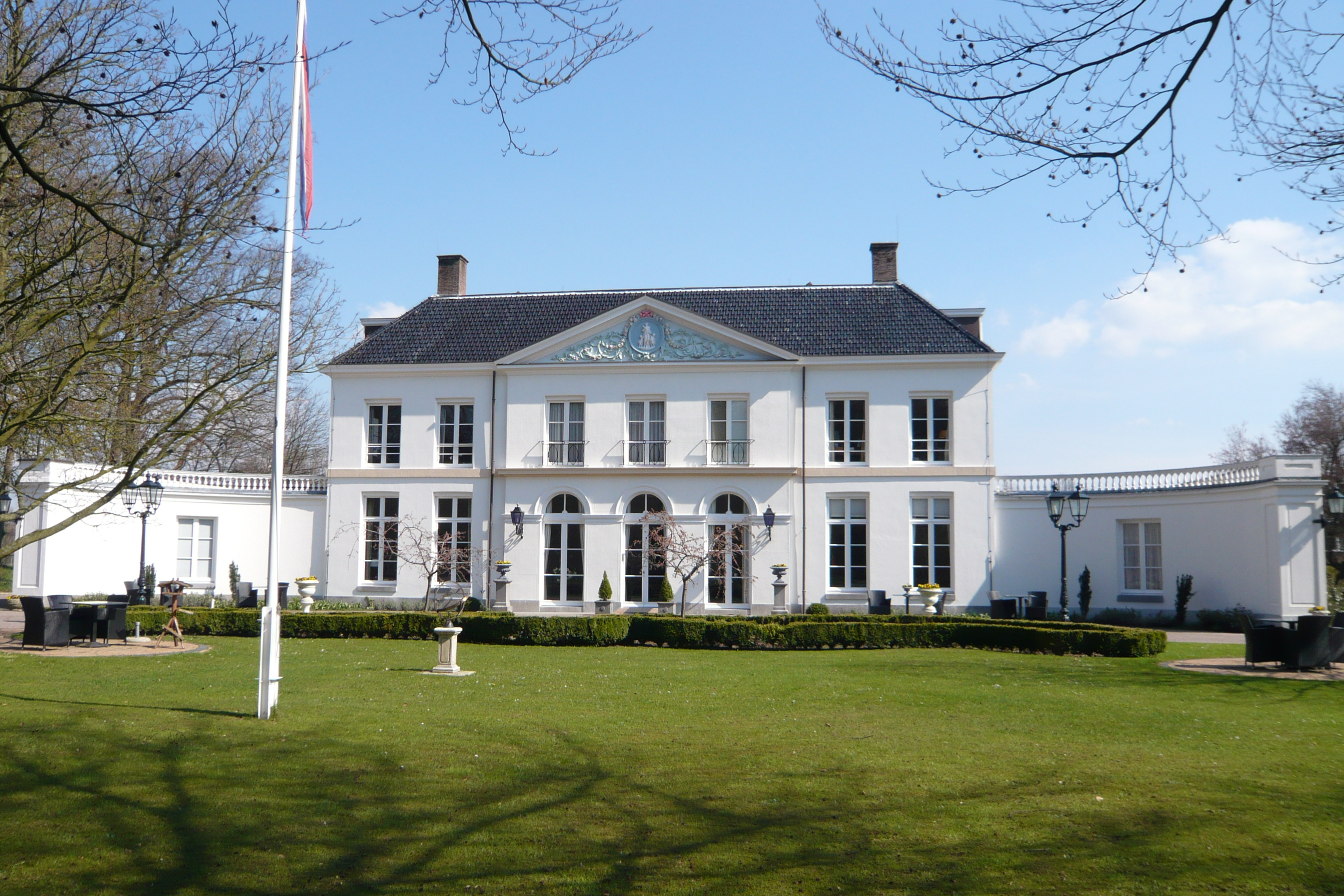 Wildhoef, Kennemerweg 32, Bloemendaal. In 1784 heeft de Haarlemse koopman Willem Philip Kops de hofstede gekocht en voegde daarbij een bos, boerderij, en theekoepel.